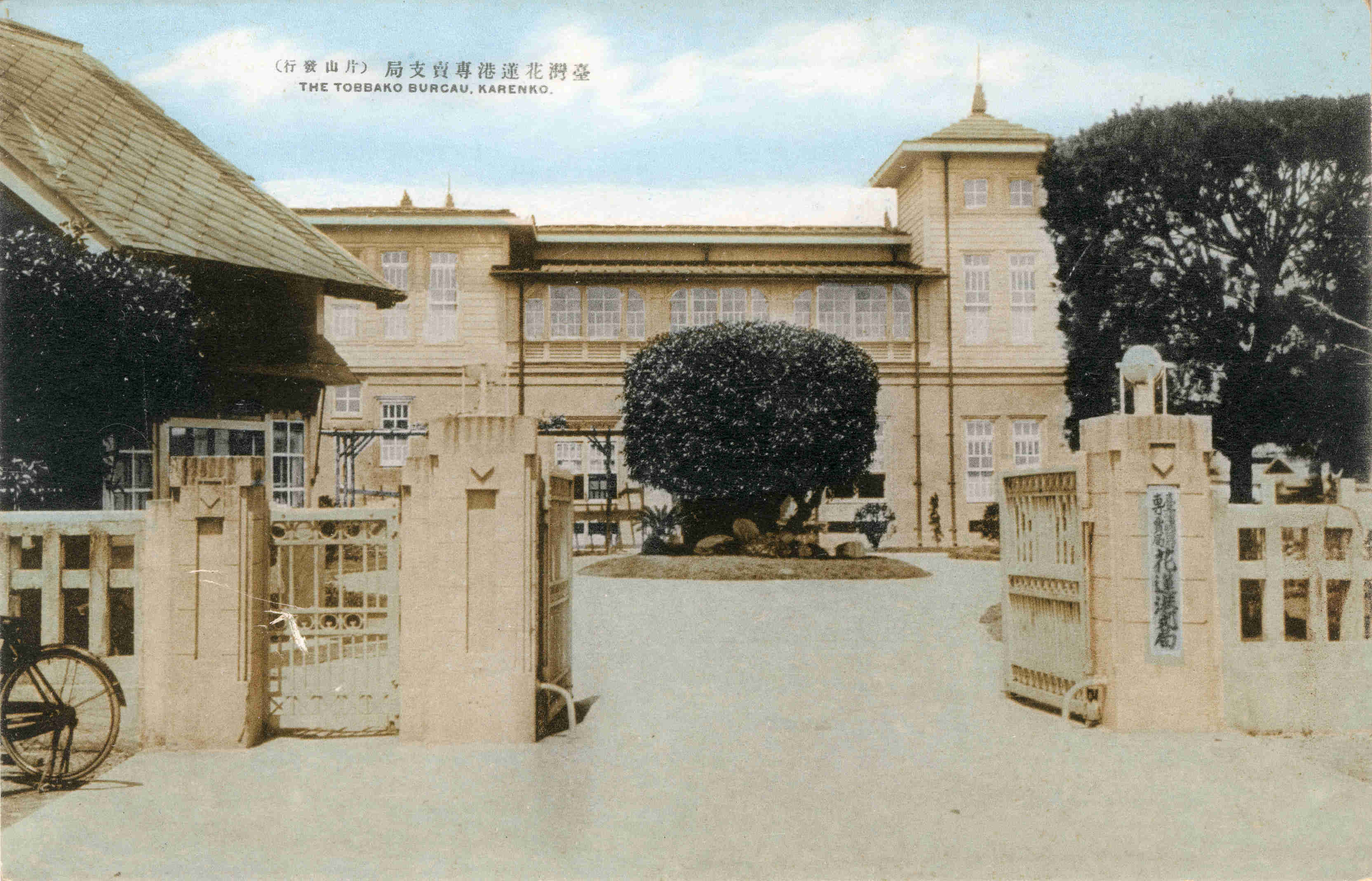 臺灣花蓮港專賣支局